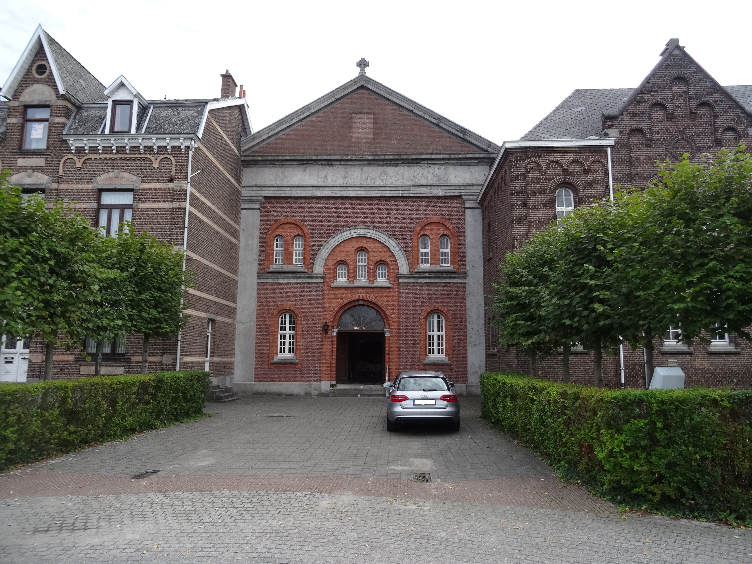 In de volksmond de Karmel genoemd.